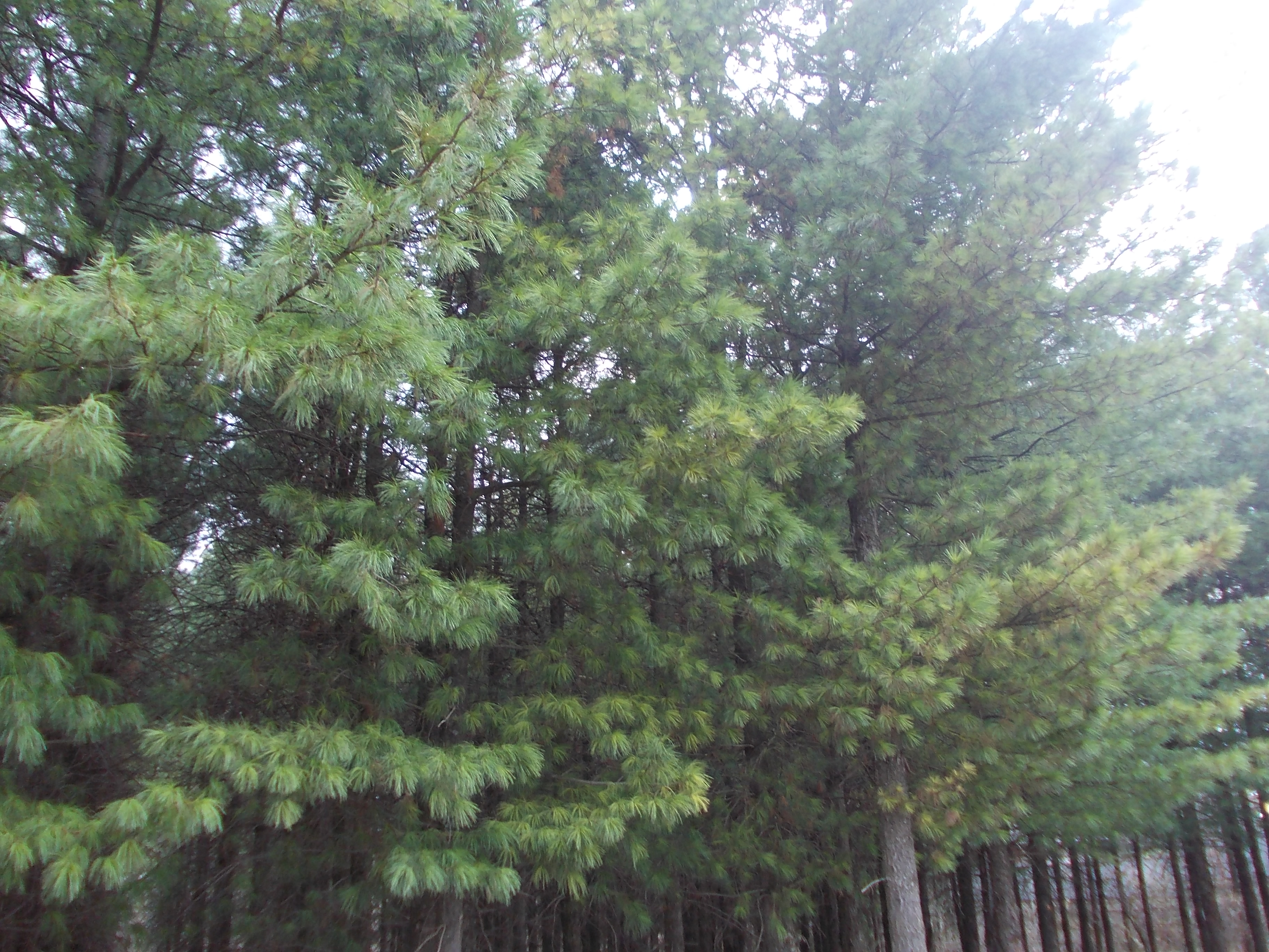 Культуры кедра посадки 1961 г. и вся растительность: Стерлитамакский район, Башкортостан This image is related to the protected area of Russia number 0210206